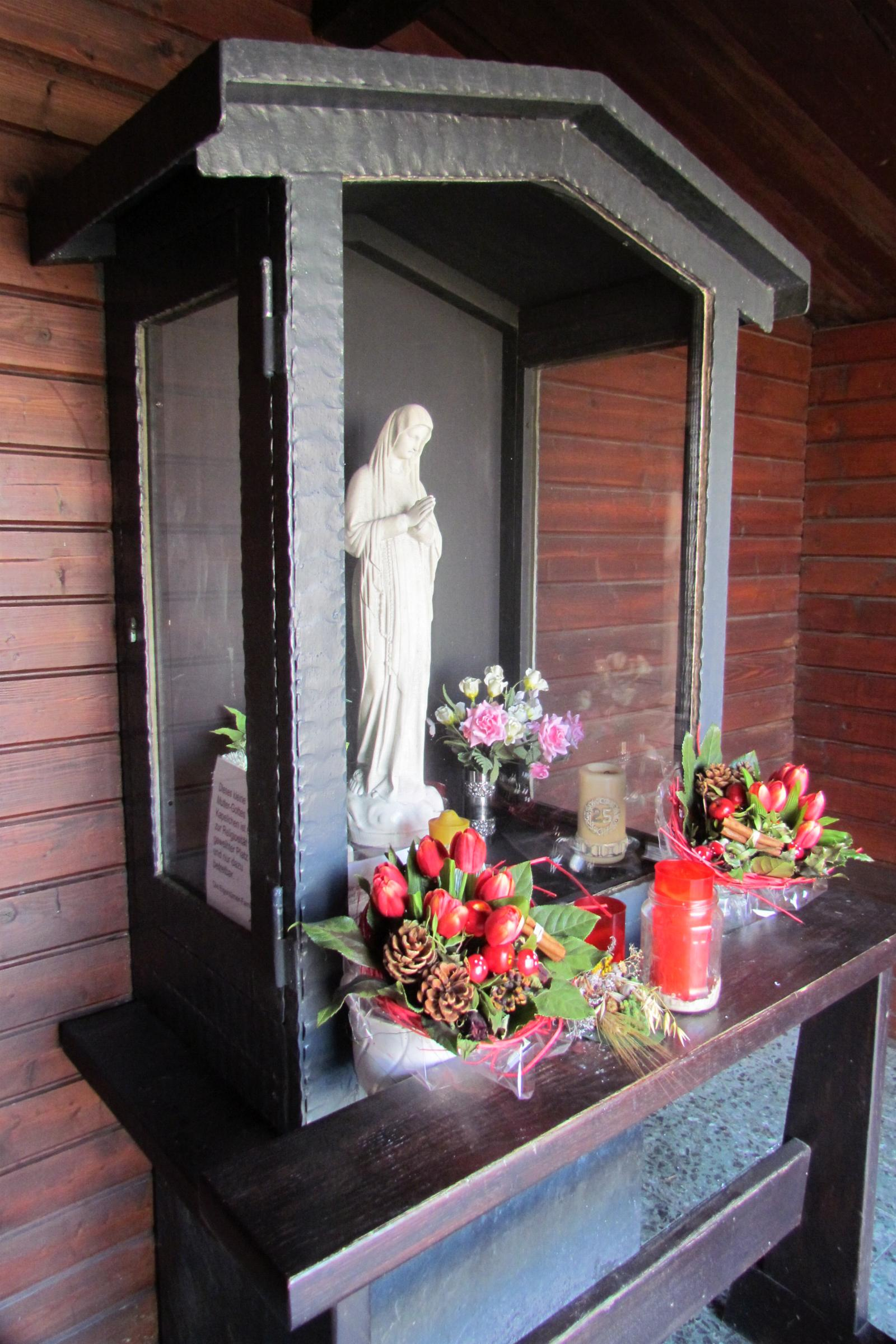 Innenansicht der Marienkapelle in Lindern